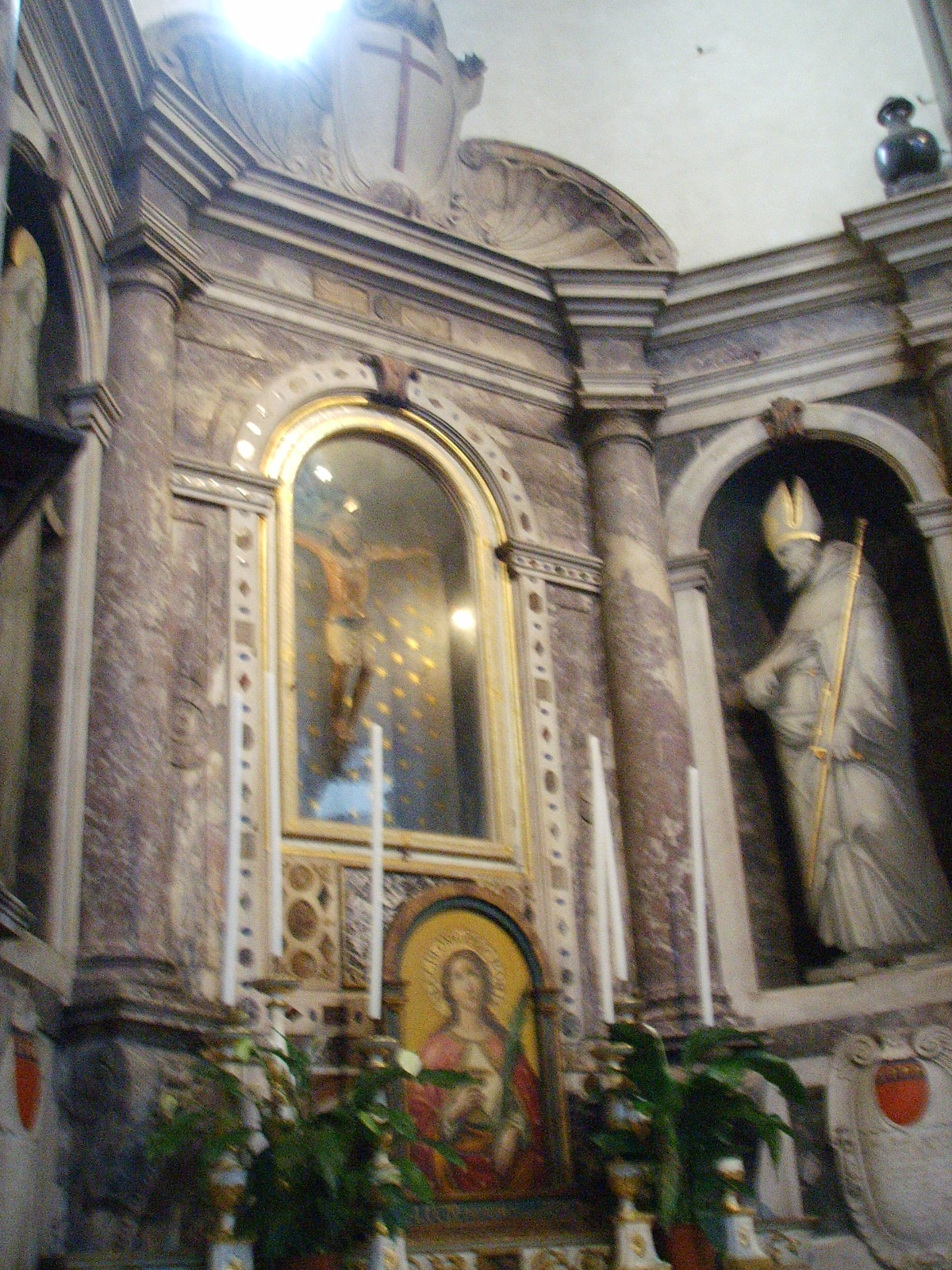 Santo Spirito, Cappella de Rossi 01 crocifisso dei bianchi e architetture e pitture di buontalenti (1601)